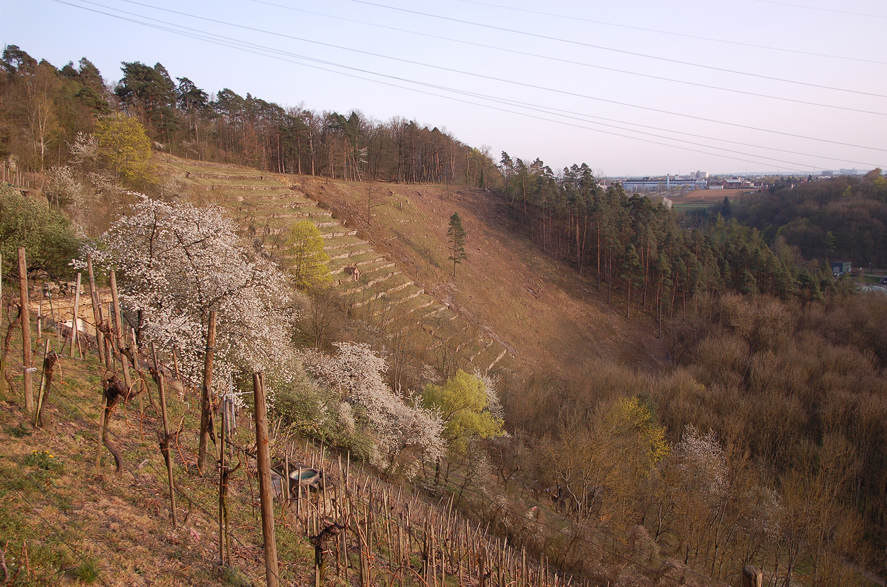 Südexponierter Steilhang im Remminger Tal: Weinberg, Sozialbrache, Magerrasen und Hangwald mit Kiefern.